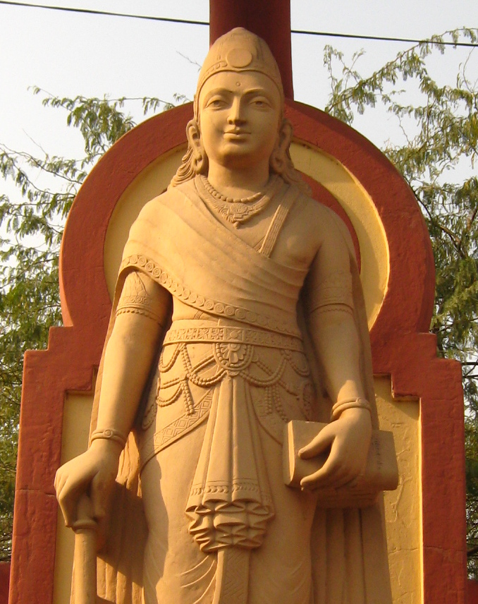 बिरला मंदिर, दिल्ली में एक शैल-चित्र